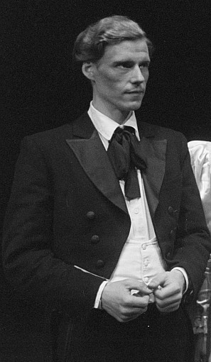 Original image description from the Deutsche FotothekSzenenbilder